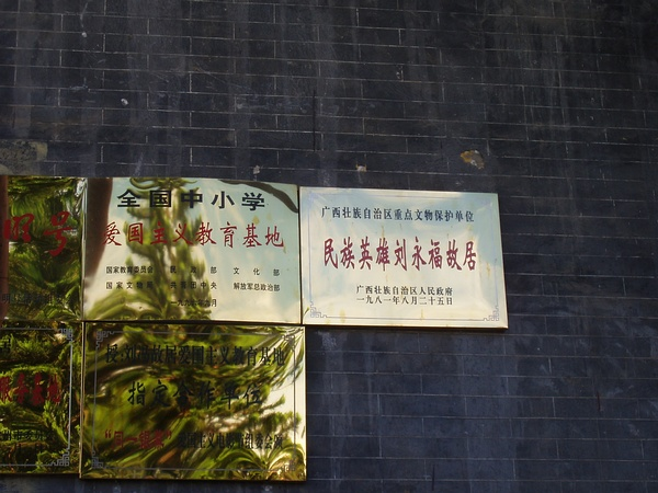 爱国主义教育基地之一“刘永福故居”